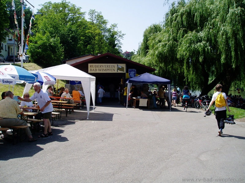 Bootshaus des RV Bad Wimpfen im Sommer 2006